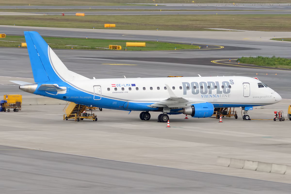 People's Viennaline, OE-LMK, Embraer ERJ-170STD